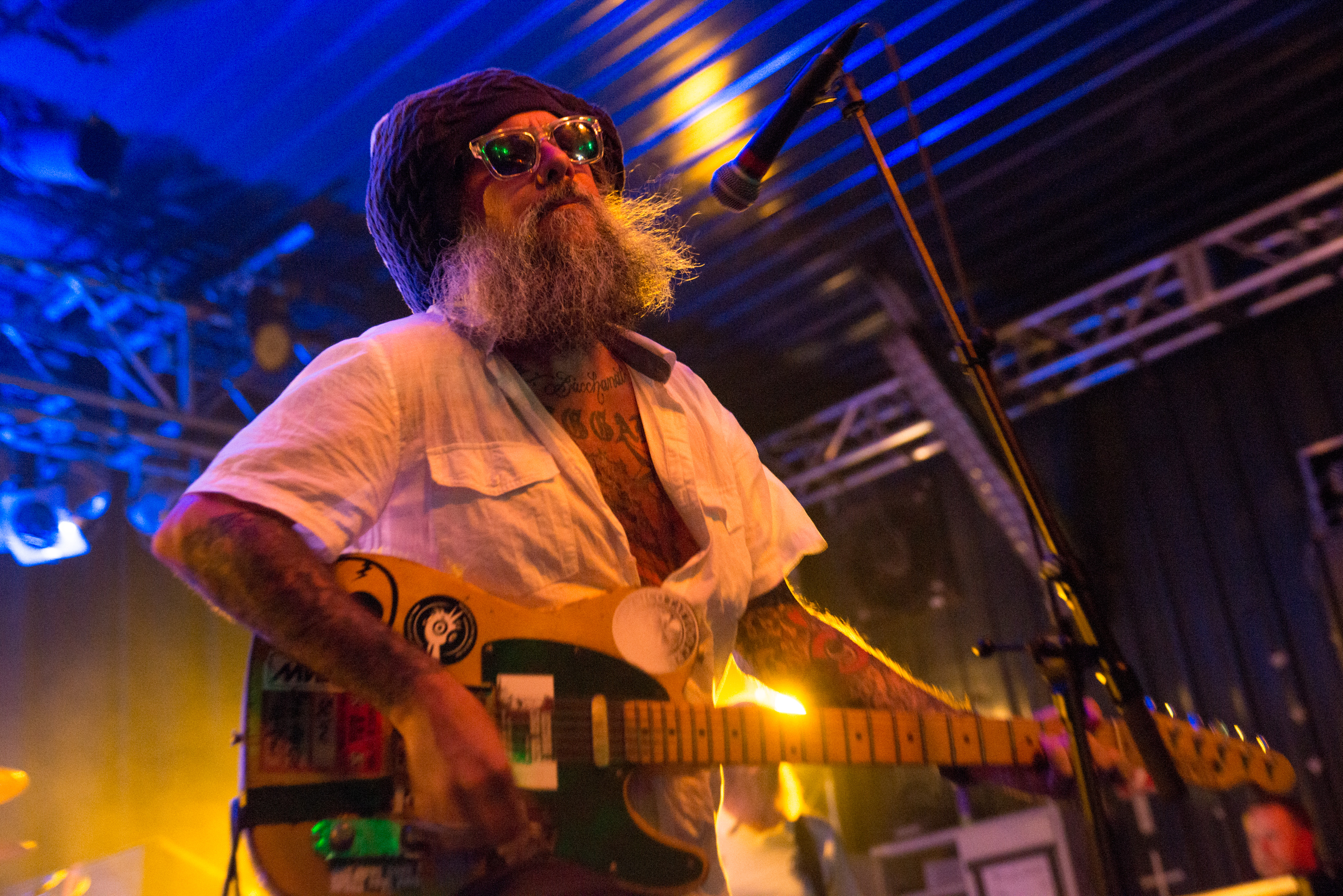 de